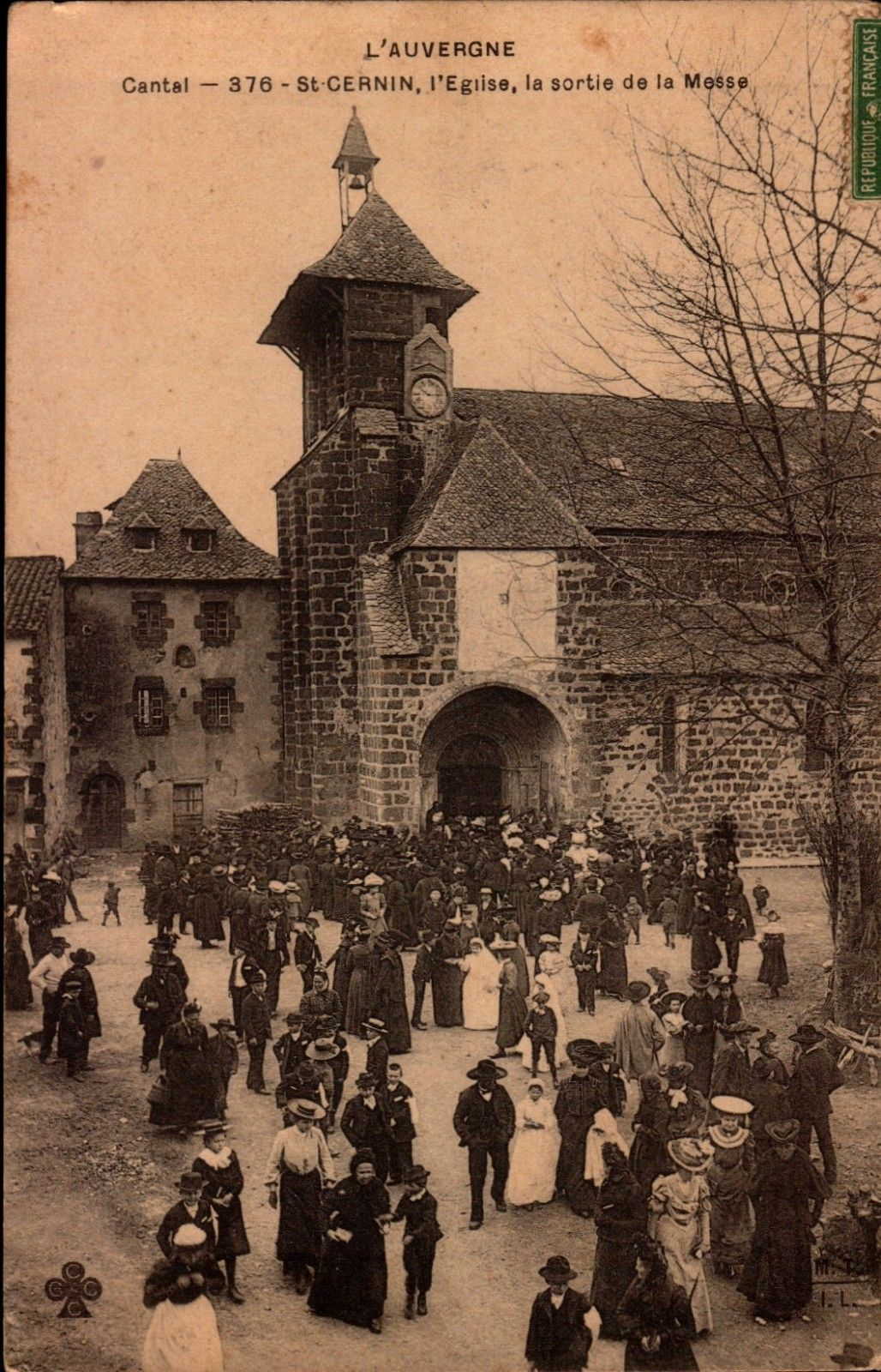 Sortie de la communion solennelle à l'église de Saint-Cernin entre 1905 et 1910.